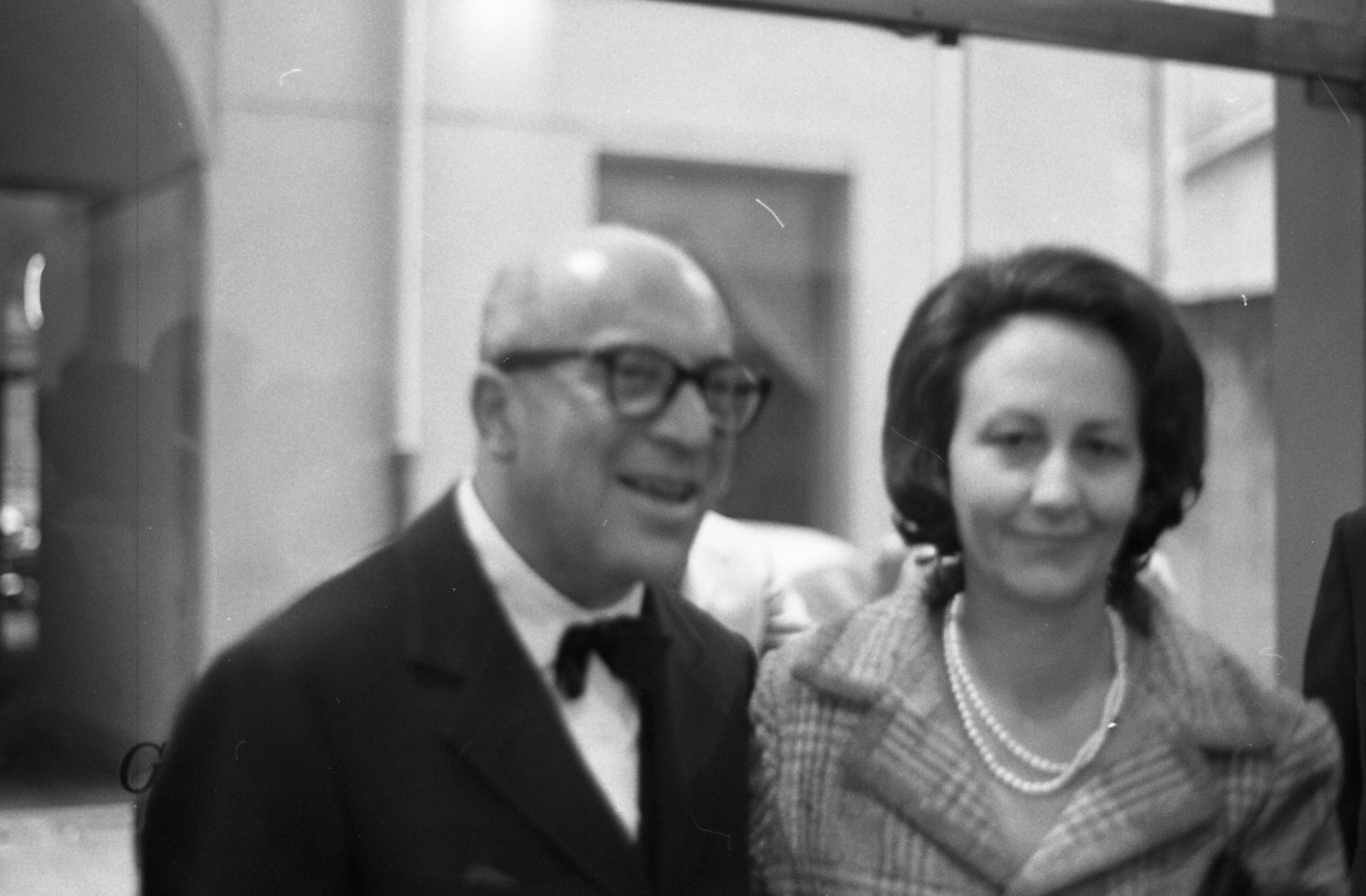 Milano. Galleria Ariete. Lucio Fontana, mostra. Servizio fotografico : Milano, 1962 / Paolo Monti. - Strisce: 4, Fotogrammi complessivi: 24 : Negativo b/n, gelatina bromuro d'argento/ pellicola ; 35 mm. - ((I fotogrammi hanno una doppia numerazione. - Sul portanegativi: Pentax Tri X. - Tra il 1953 e il 1957 Monti realizza un' importante serie di ritratti di artisti come Lucio Fontana, Hans Hartung e Giò conosciuti per il tramite del fratello del gallerista veneziano Carlo Cardazzo. - Occasione: Inaugurazione della mostra di Lucio Fontana presso la Galleria Ariete